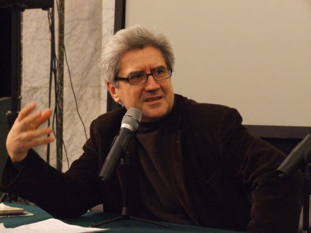 Andrzej Sapija, Warszawa, Dom Spotkań z Historią, Karowa 20. Pokaz filmów Jerzego Bossaka. Spotkanie z krytykiem filmowym Andrzejem Kołodyńskim poprowadził Andrzej Sapija.